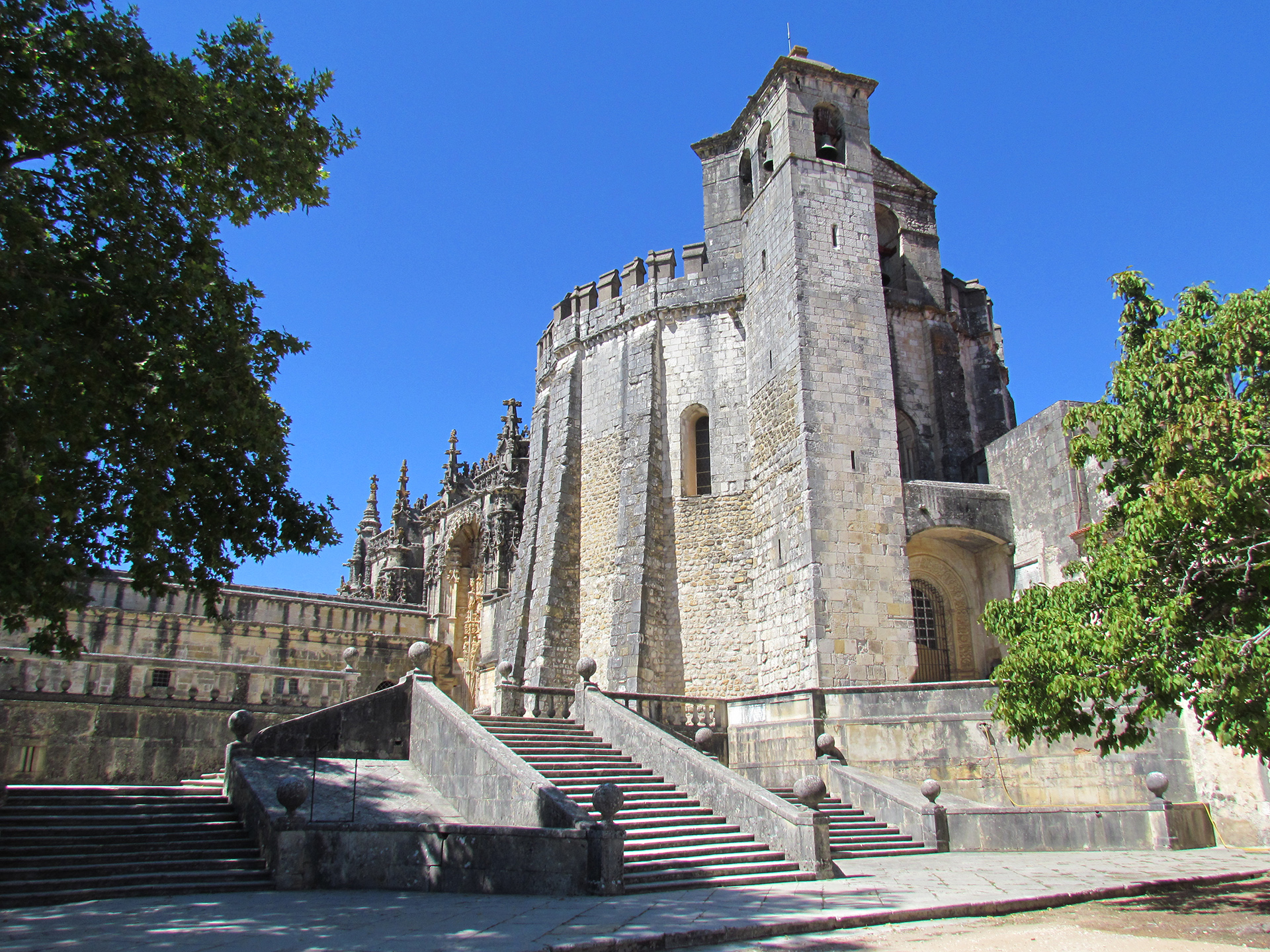 Castelo dos Templários - Tomar